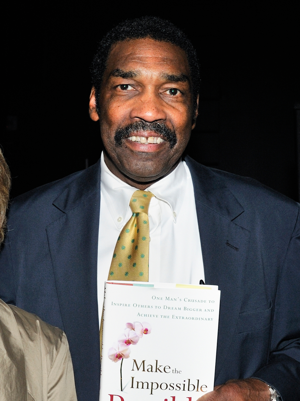 Bill Strickland